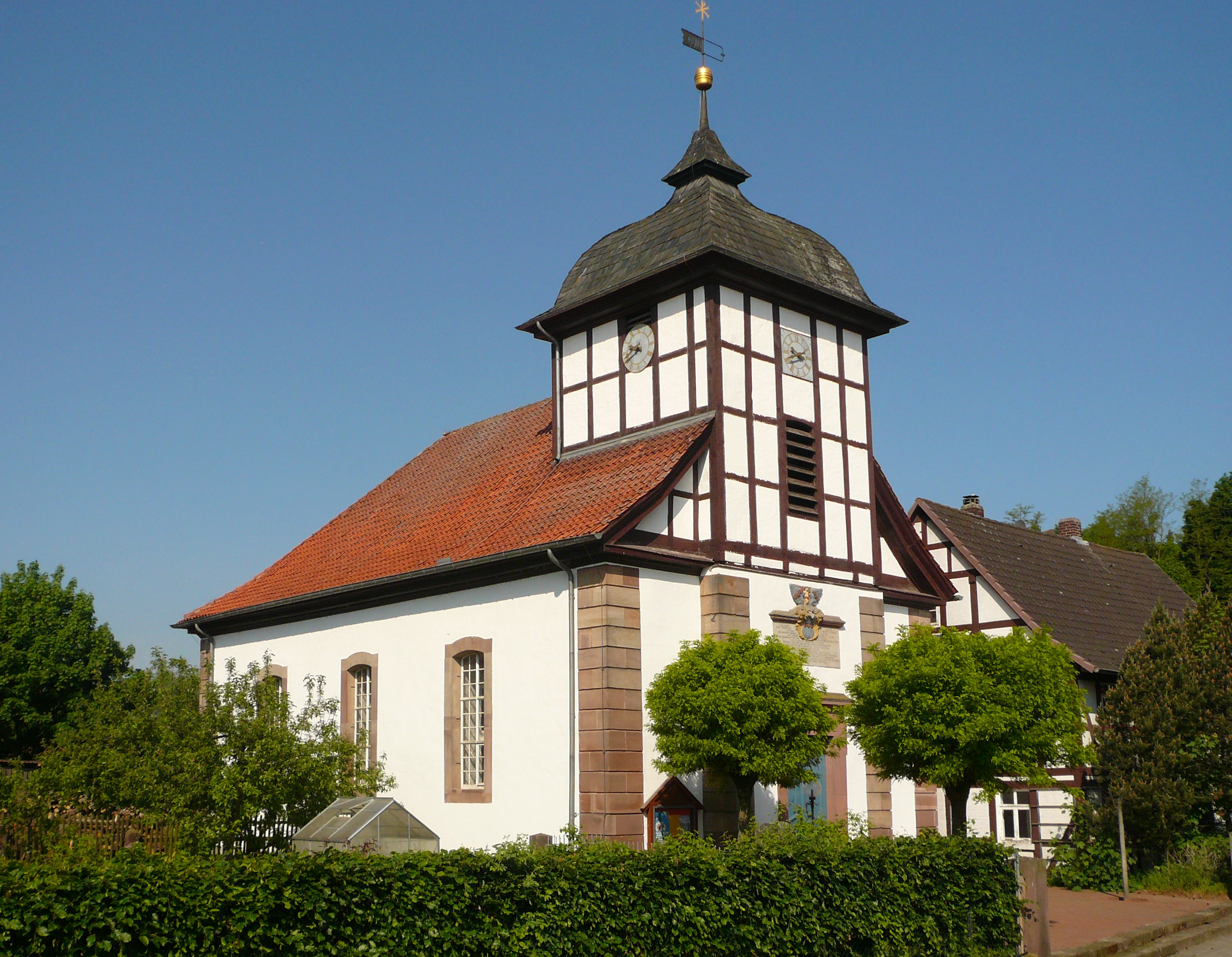 Ev.-luth. Kirche in Benniehausen, Gemeinde Gleichen, Landkreis Göttingen. Grundsteinlegung am 29. Juli 1779 durch Gottfried August Bürger